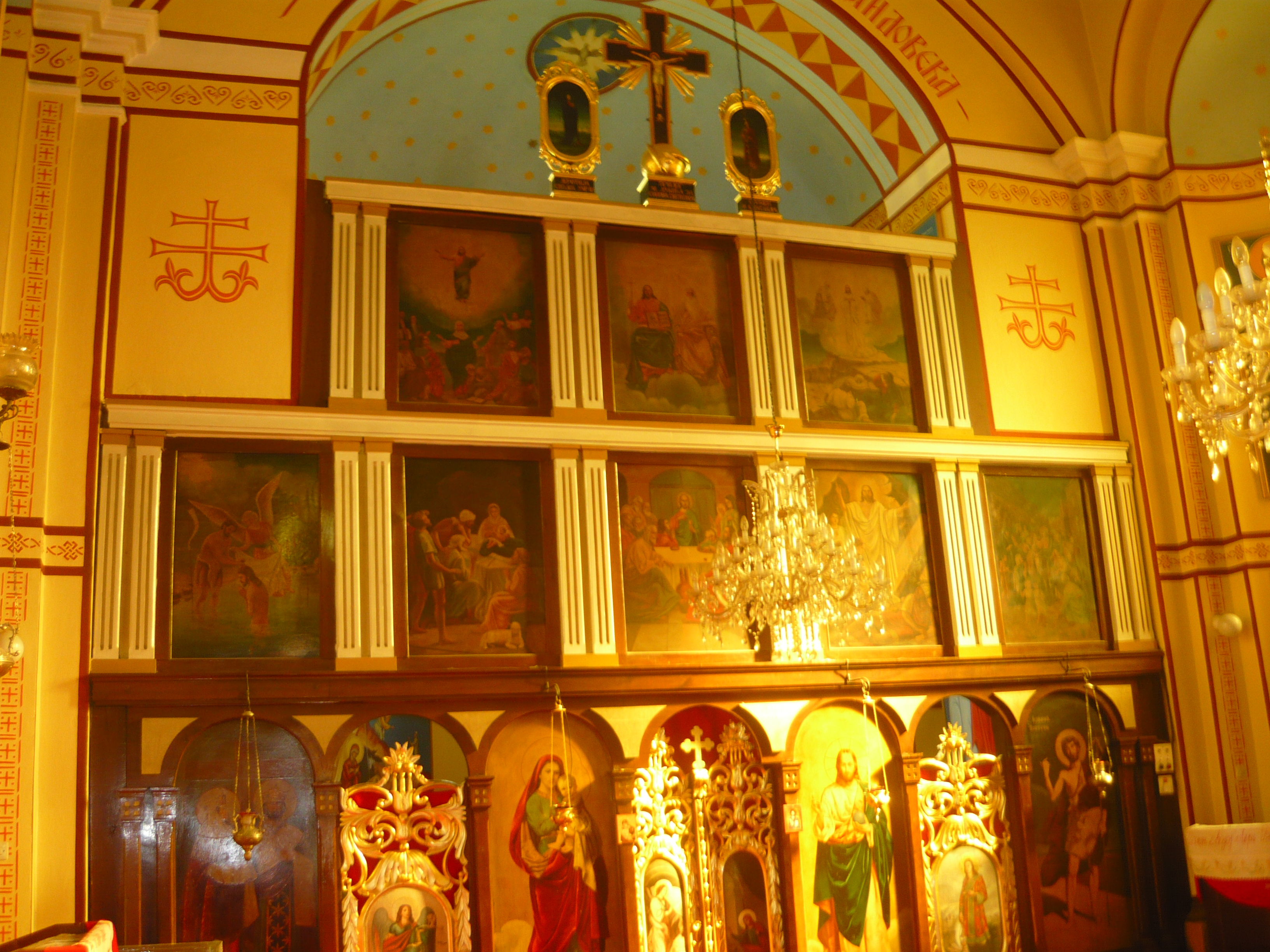 Унутрашњост цркве-олтар